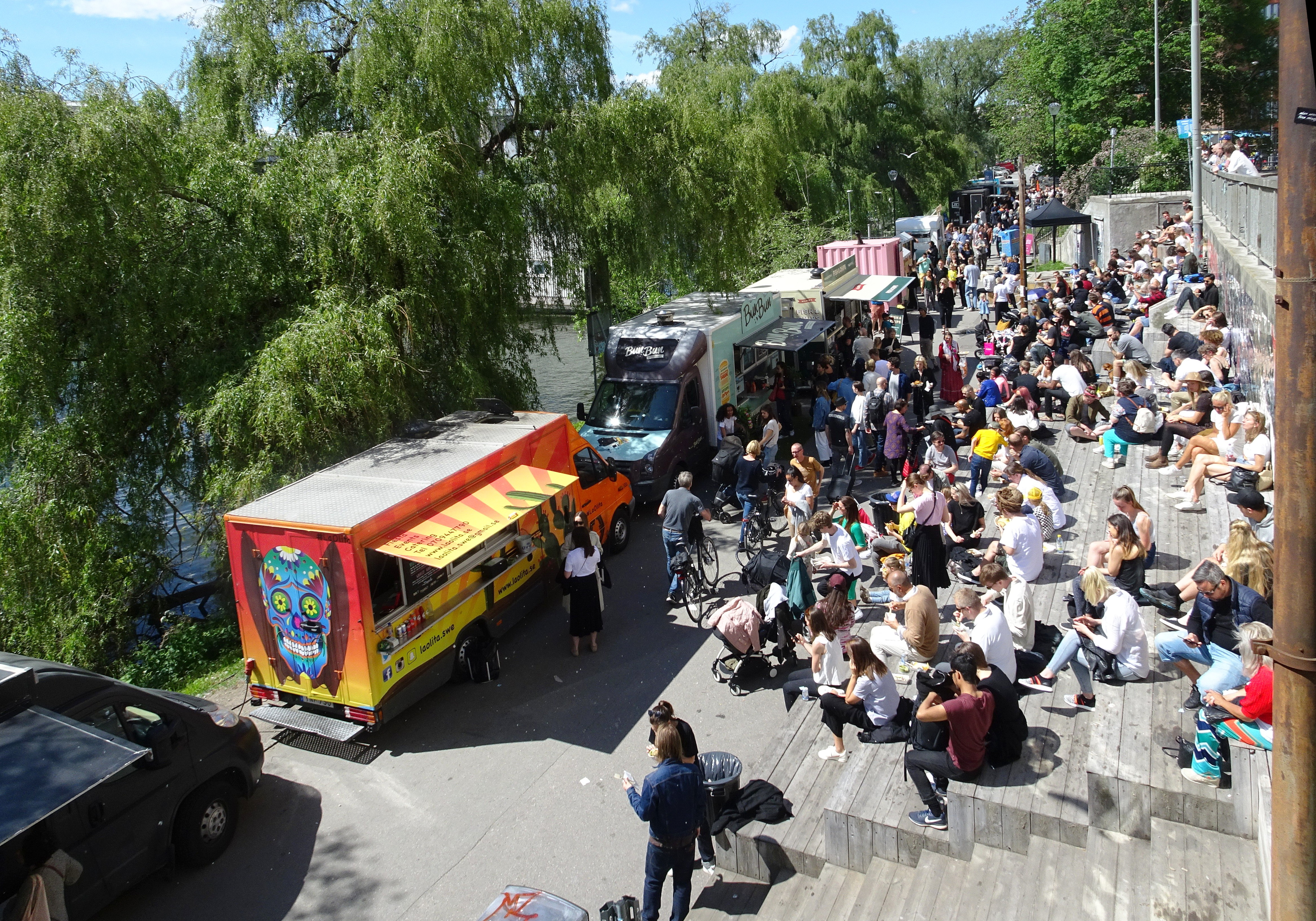 Hornstulls Marknad med Food Trucks längs Hornstulls strand